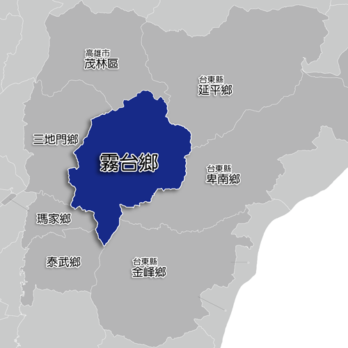 中文（台灣）: 屏東縣霧台鄉相對位置。